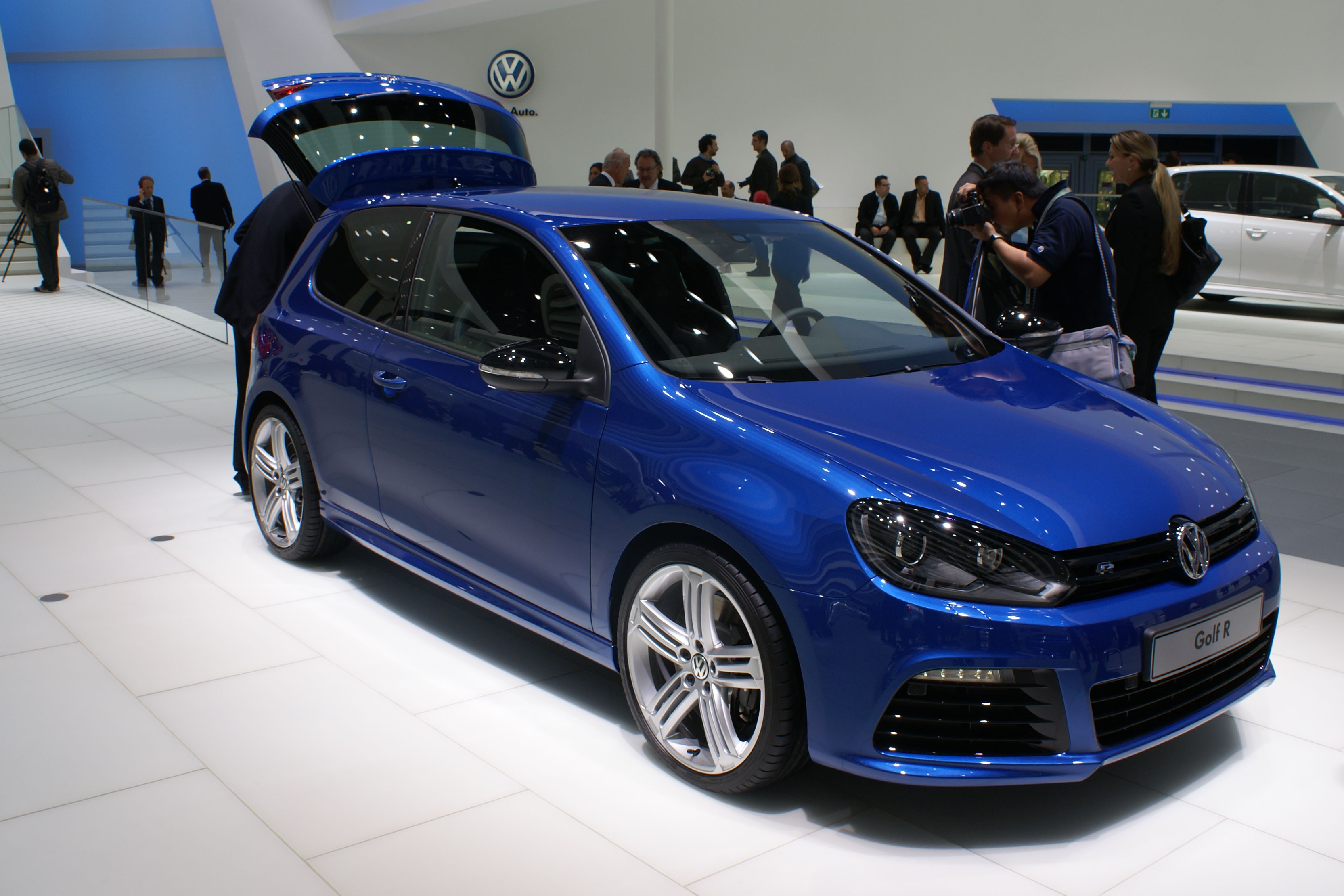 Golf R